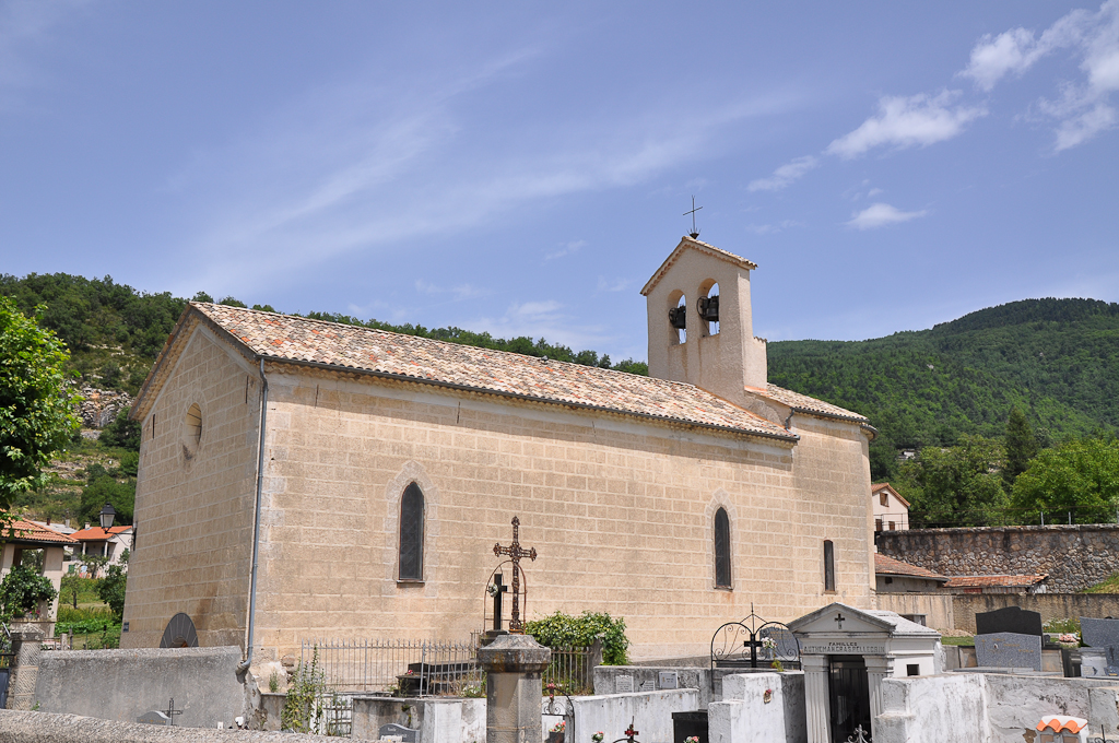 Le Fugeret, église et cimetière